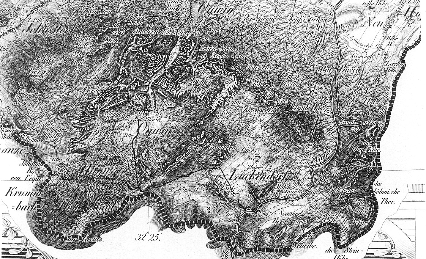 Original image description from the Deutsche FotothekOybin-Lückendorf. Oberreit, Sect. Zittau, 1844/46